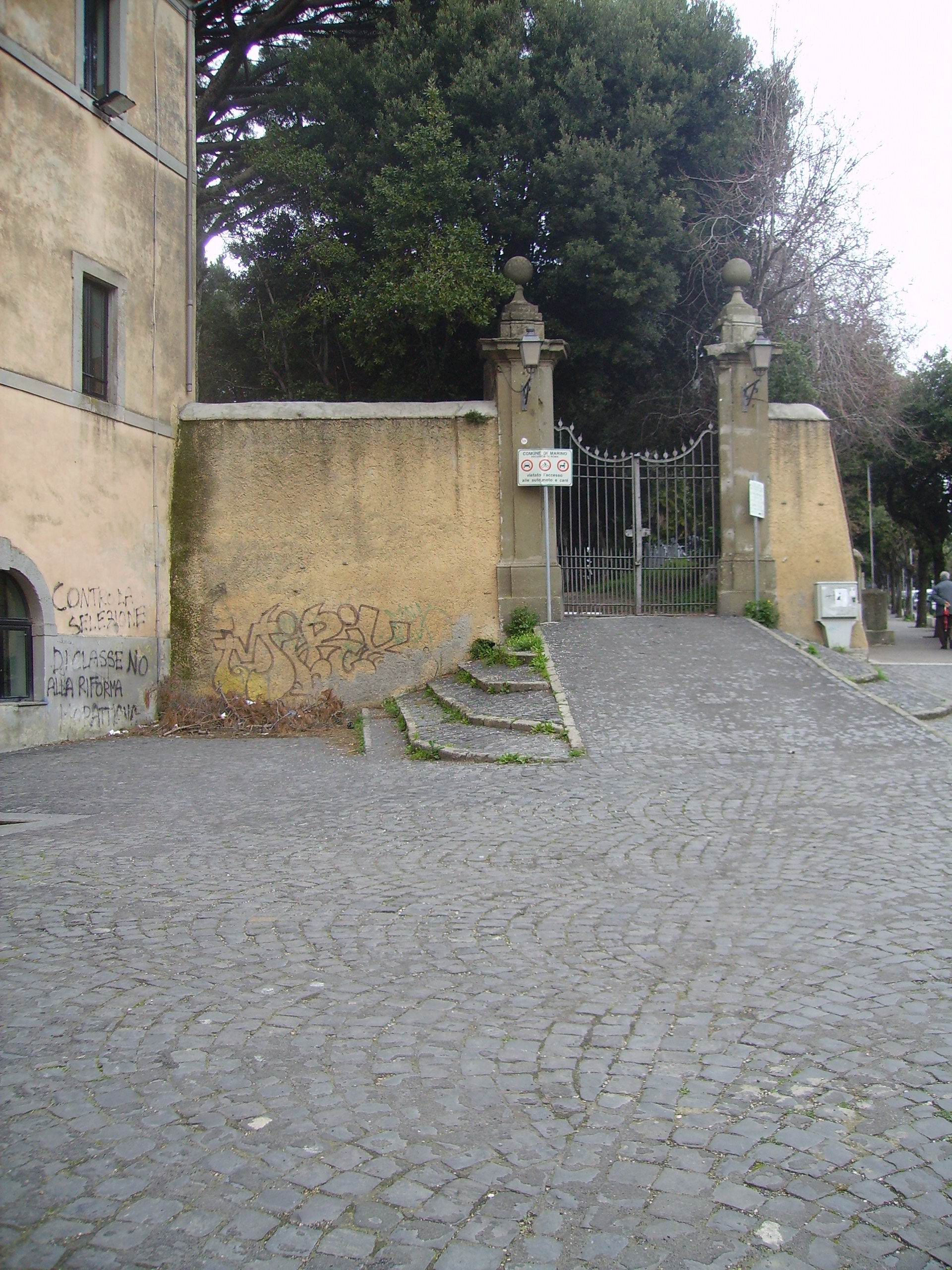 Ingresso laterale di Villa Colonna-Belpoggio-Desideri